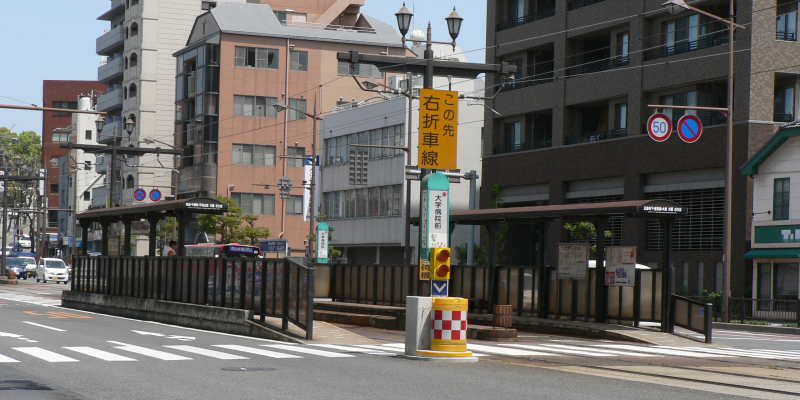 長崎電気軌道、大学病院前電停